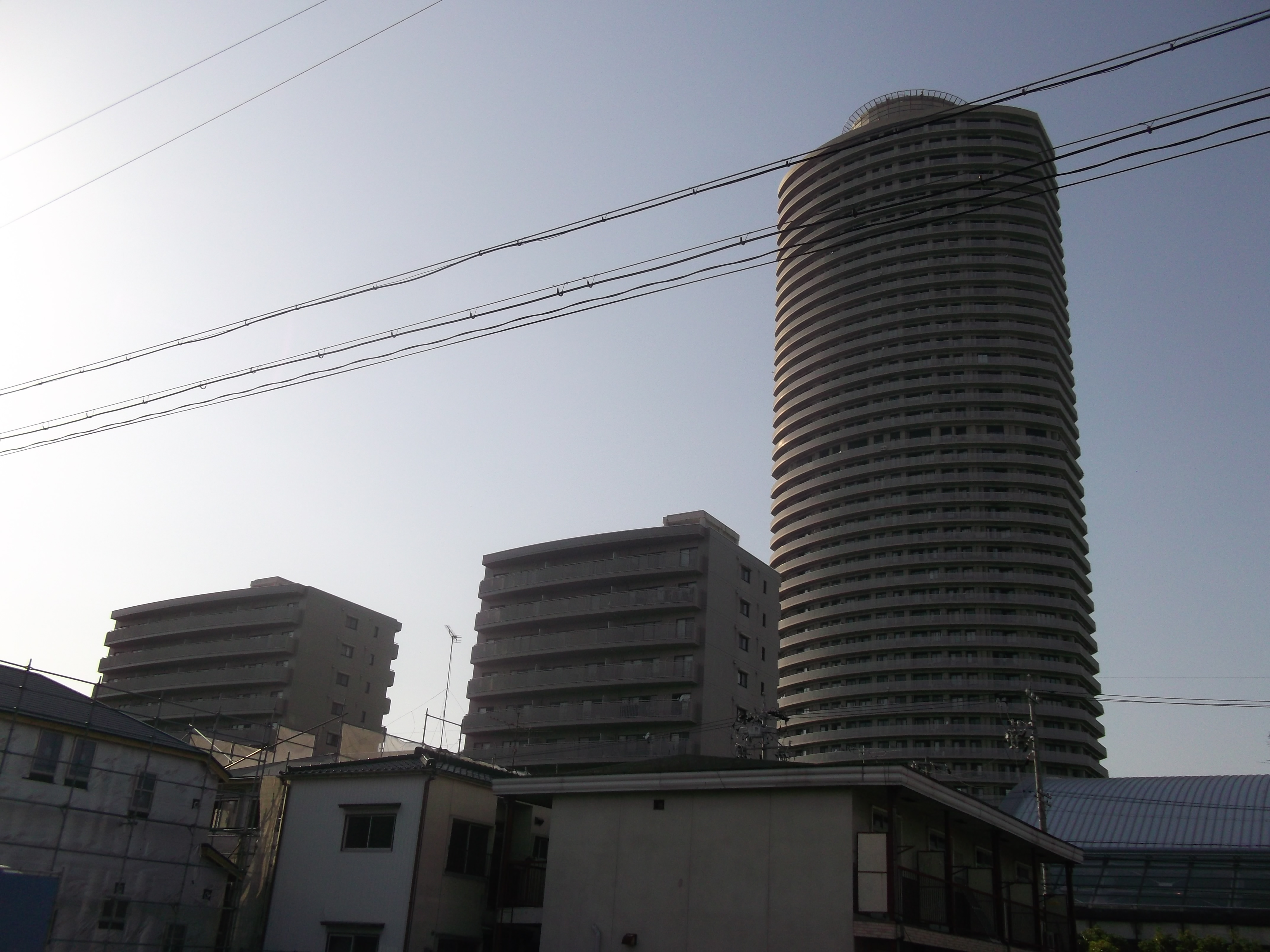 名古屋市北区成願寺のザ・シーン城北を南側公道より写す